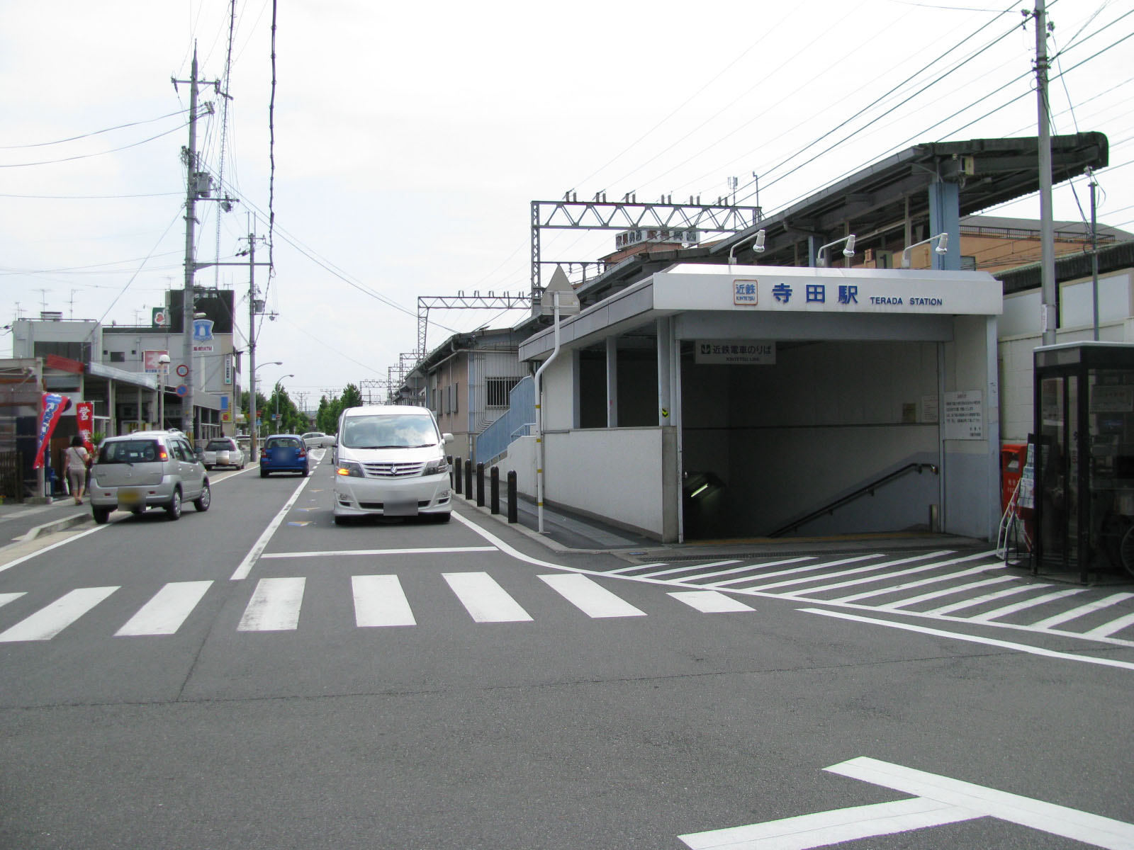 近鉄線寺田駅